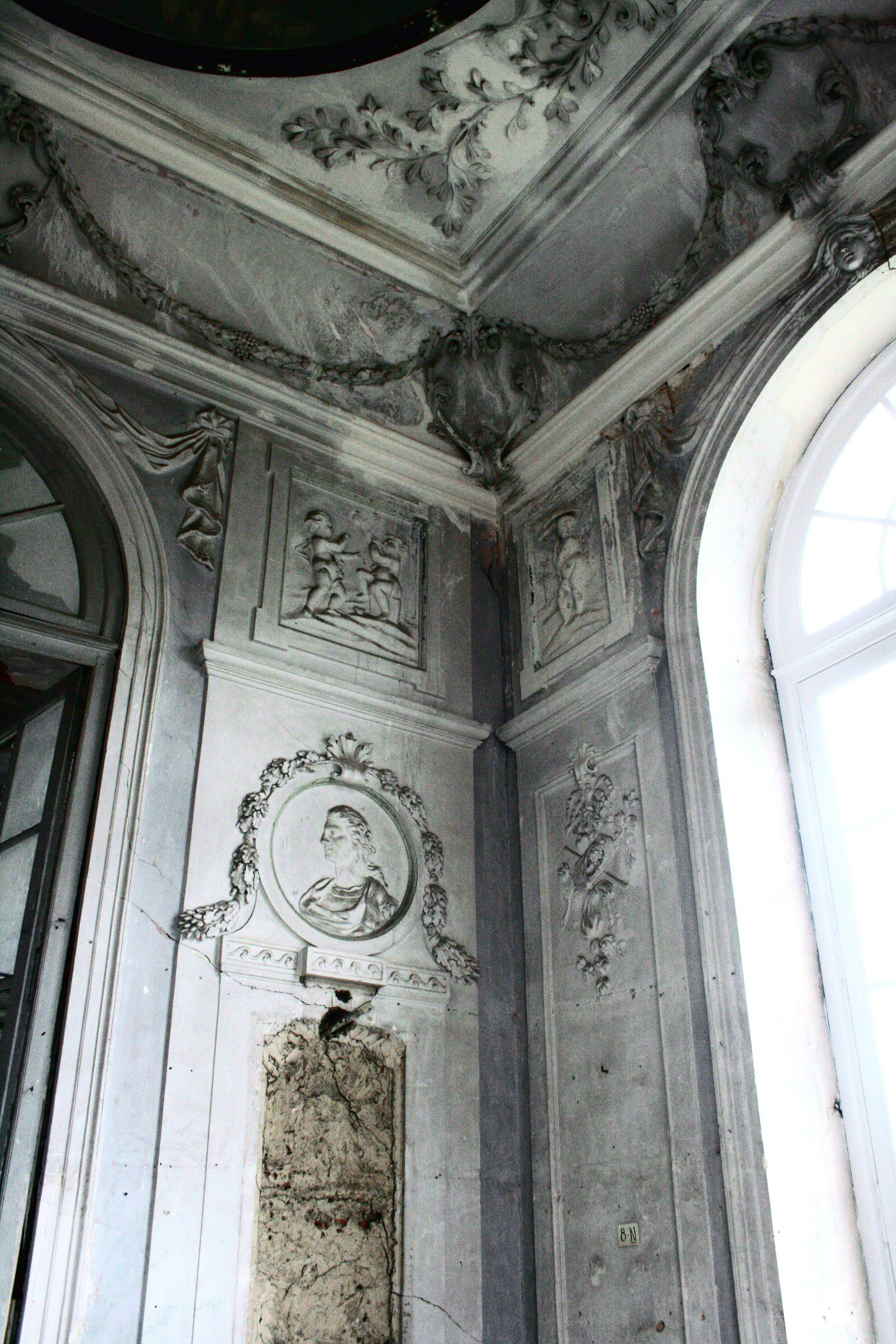 Maison de jeux du Waux-Hall (1769-1779), Spa, (Belgique), oeuvre de l'architecte Jacques-Barthélémy Renoz, du stuccateur Antoine-Pierre Franck et du peintre Henri Deprez. Etat en 2009.